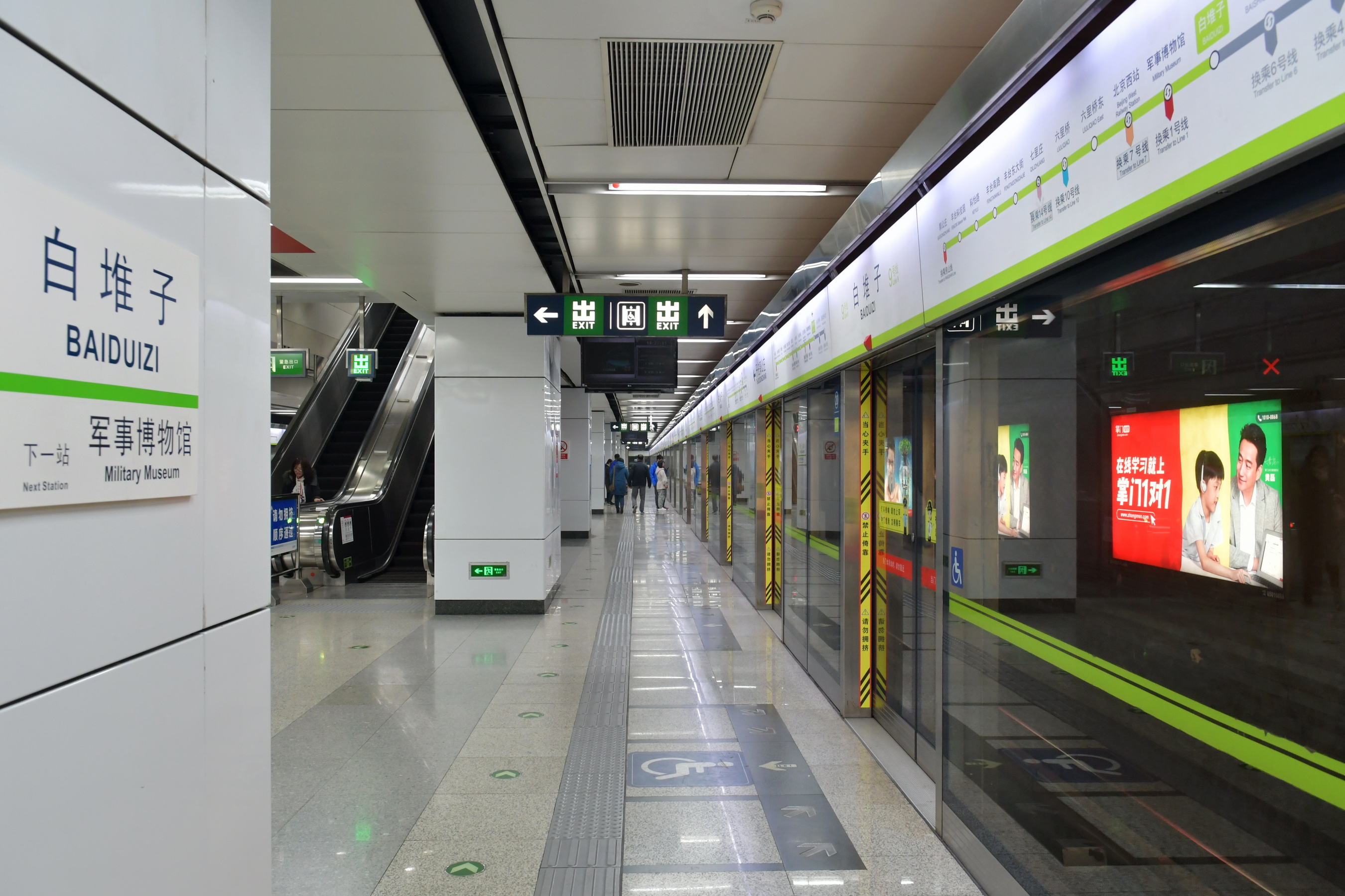 北京地铁9号线白堆子站站台